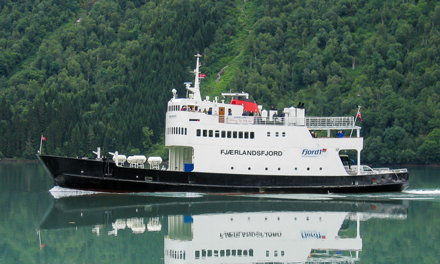 MF Fjærlandsfjord